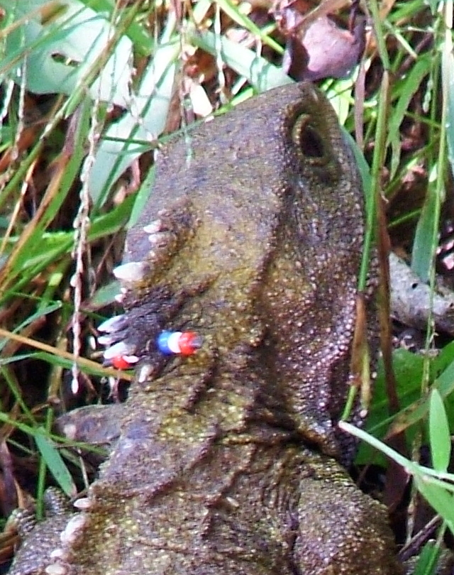 A marked tuatara at Karori Wildlife Sanctuary.Tuatara